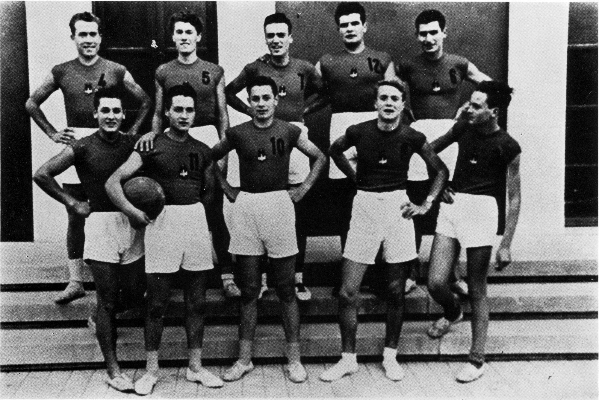 La squadra di basket di Montevarchi campione provinciale nel 1938: Semplici, Tosi, Peri, Rabatti, Bartolini, Gardeschi, Vivaldi, Bartoli, Sani